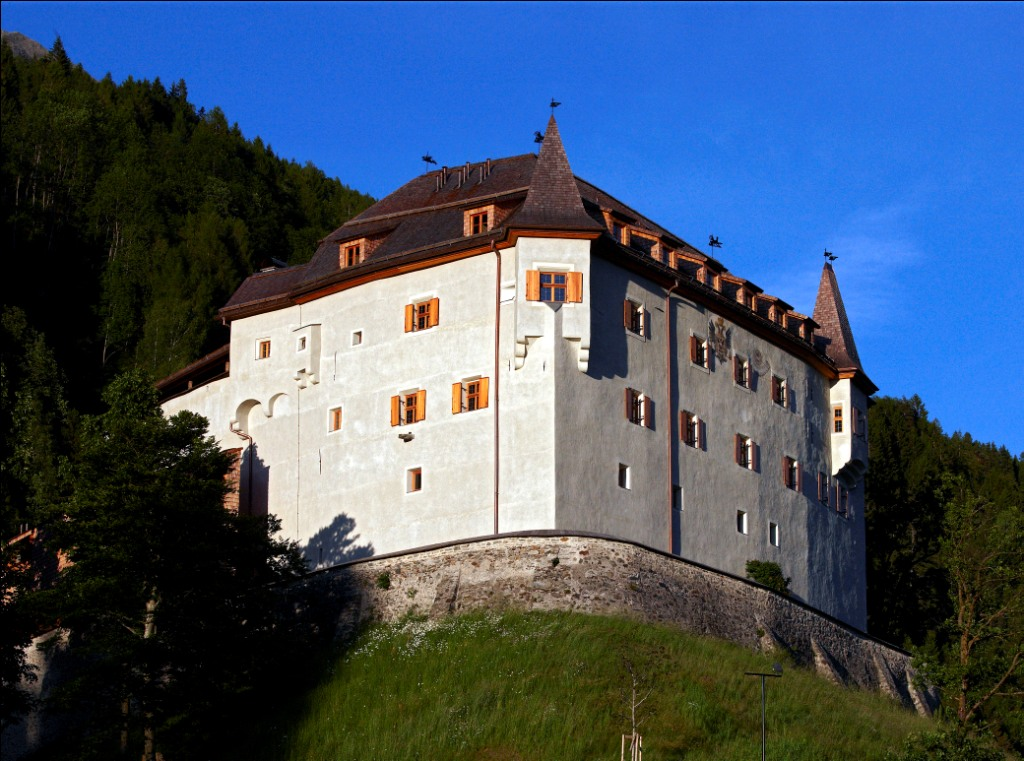 Schloss Lengberg von Südwesten